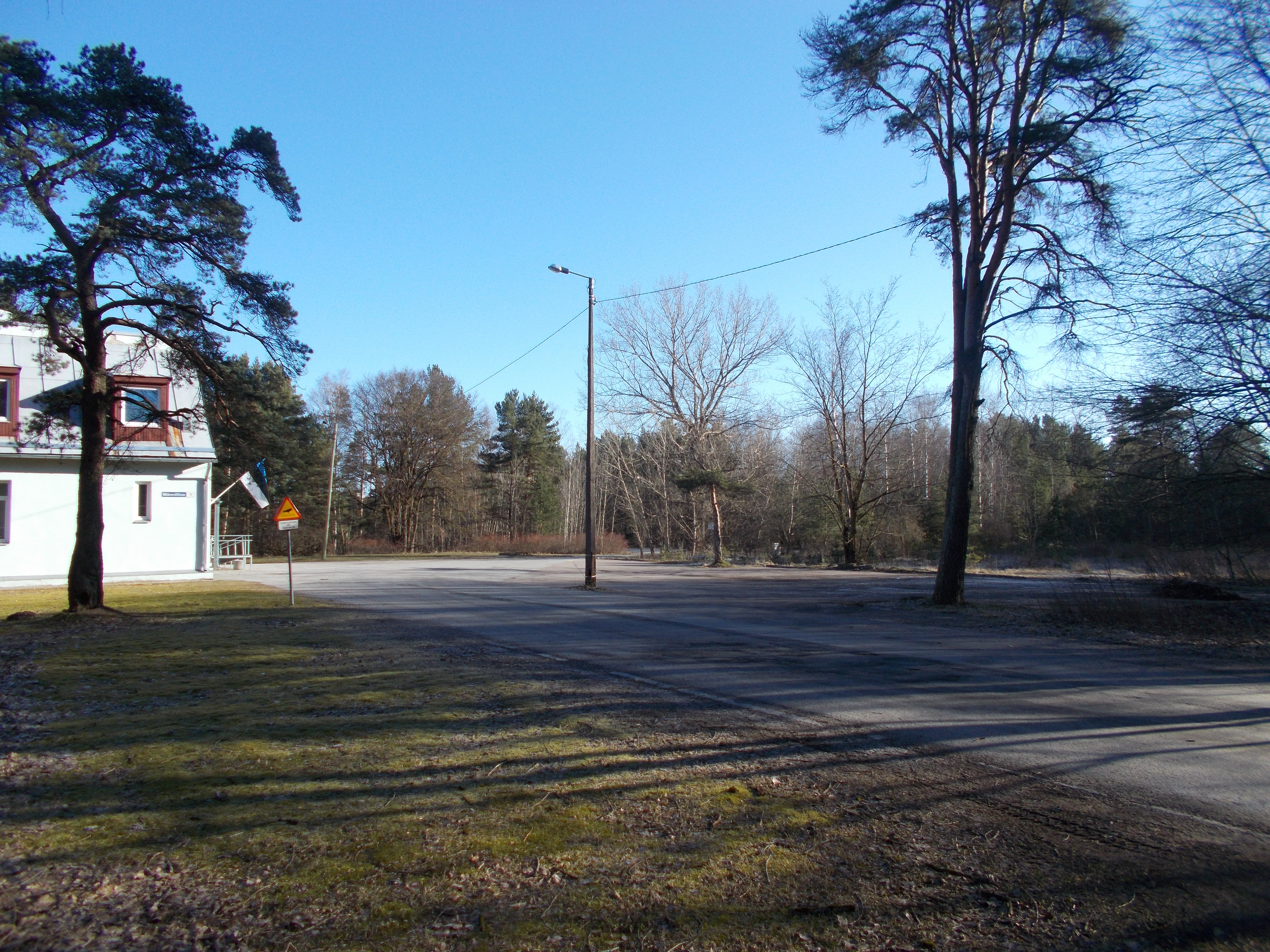 Männiliiva tänav Mustamäel